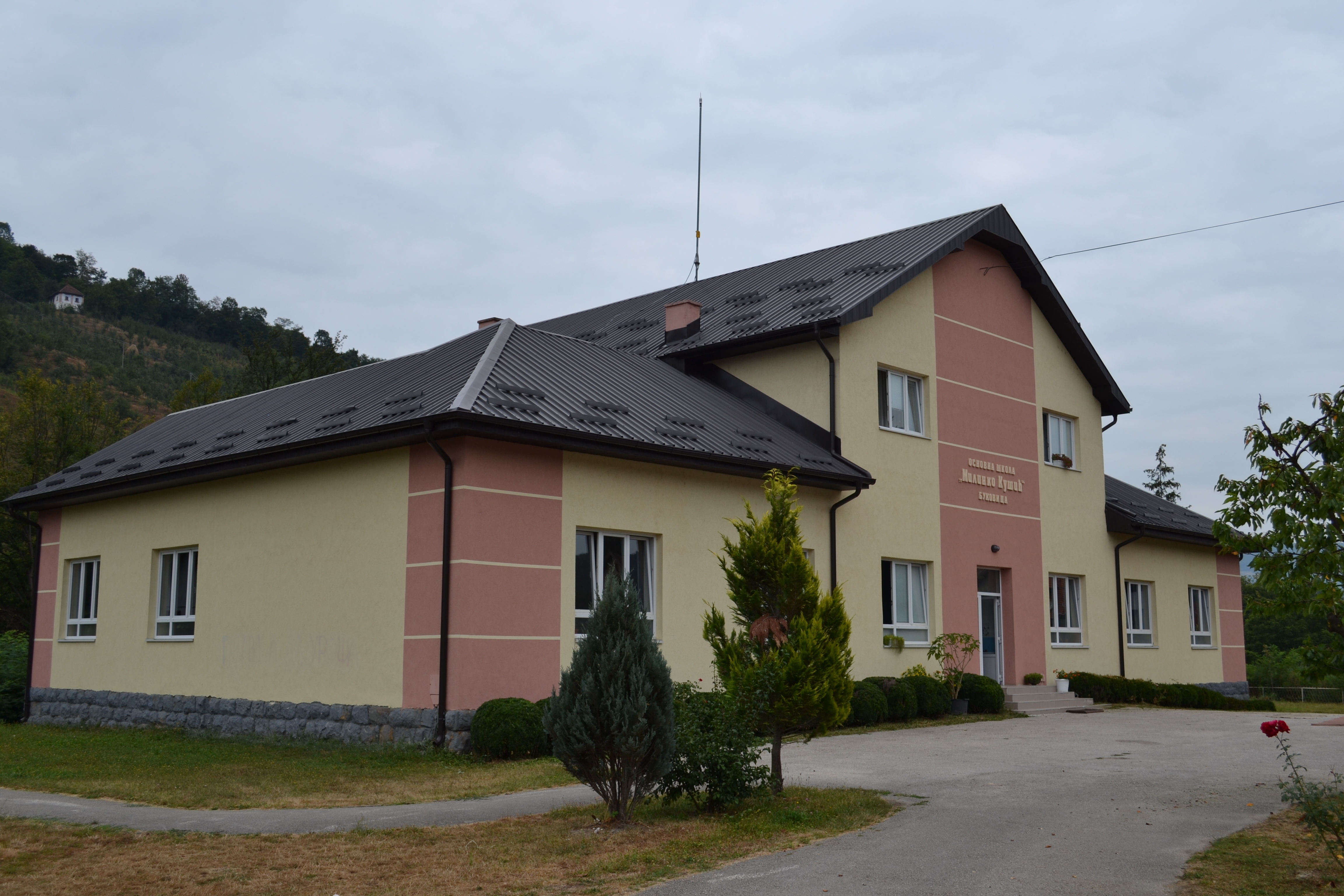 Škola u Bukovici